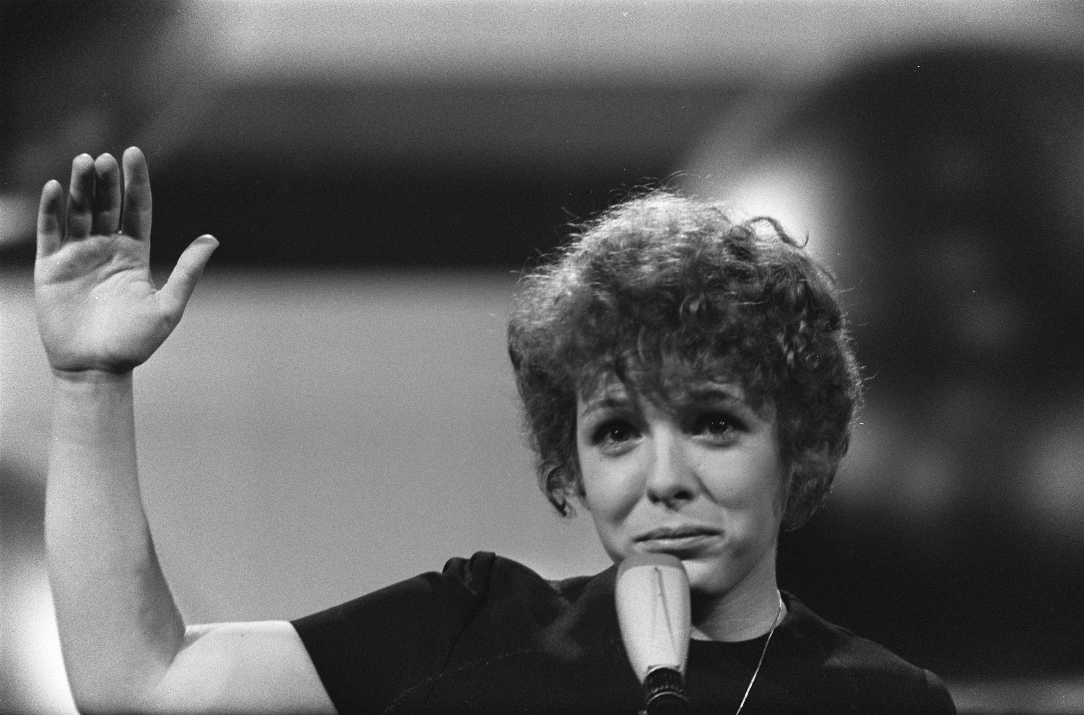 Collectie / Archief : Fotocollectie Anefo Reportage / Serie : Eurovisie Songfestival 1970 in RAI te Amsterdam Beschrijving : Dominique Dussault (Monaco) Datum : 21 maart 1970 Locatie : Amsterdam Trefwoorden : artiesten, songfestivals, zangers Persoonsnaam : Dussault, Dominique Instellingsnaam : Eurovisie Song Festival Fotograaf : Koch, Eric / Anefo Auteursrechthebbende : Nationaal Archief Materiaalsoort : Negatief (zwart/wit) Nummer archiefinventaris : bekijk toegang 2.24.01.05 Bestanddeelnummer : 923-3698